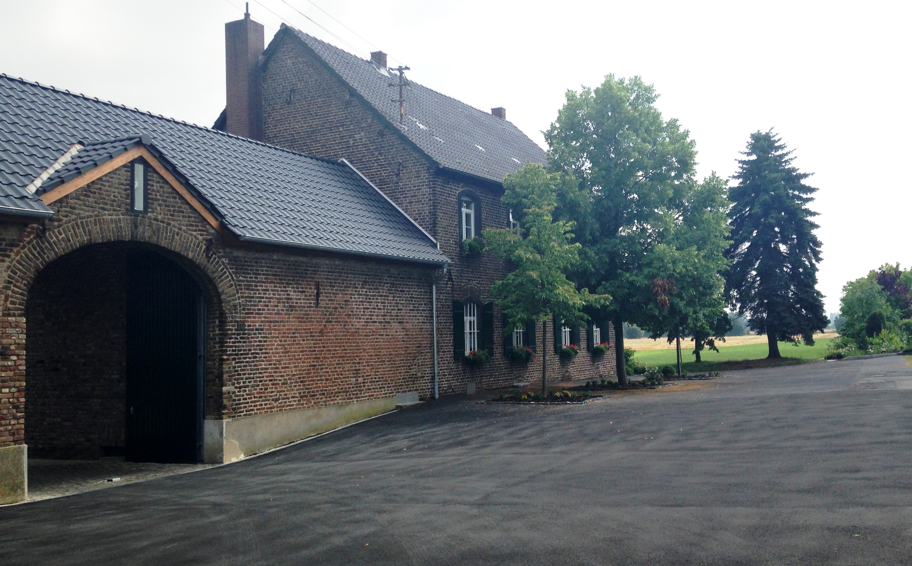 Fontansicht mit Hofeinfahrt Gut Antonitterhof in Klein-Vernich